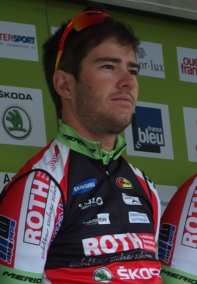 Tour de Bretagne 2015 - Présentation des équipes au départ de la troisième étape à Baud - Équipe Roth-Škoda Depicted person: Nico Brüngger